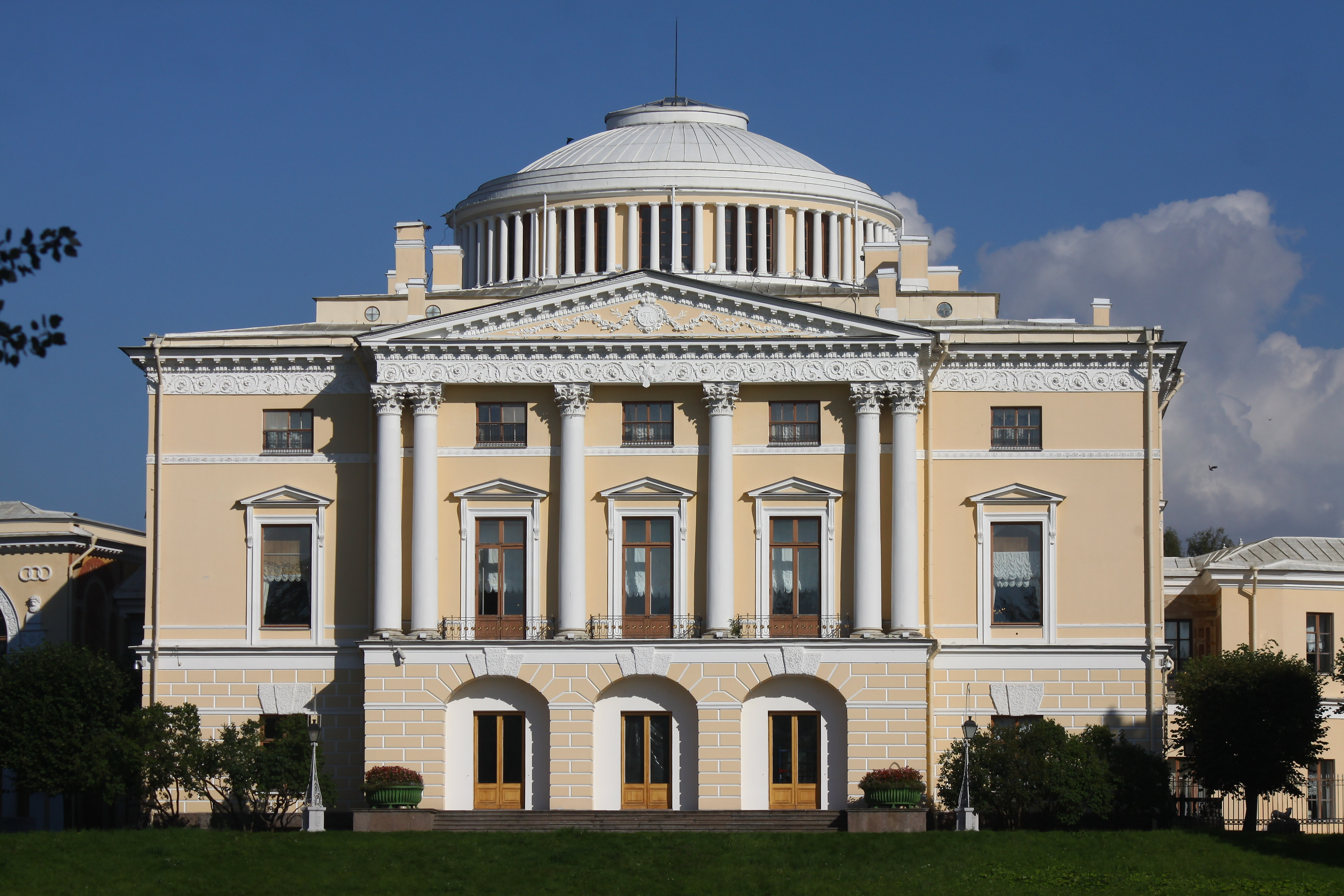 Дворец Павловский (Большой) (Санкт-Петербург и Лен.область, Павловск, улица Революции, 20)